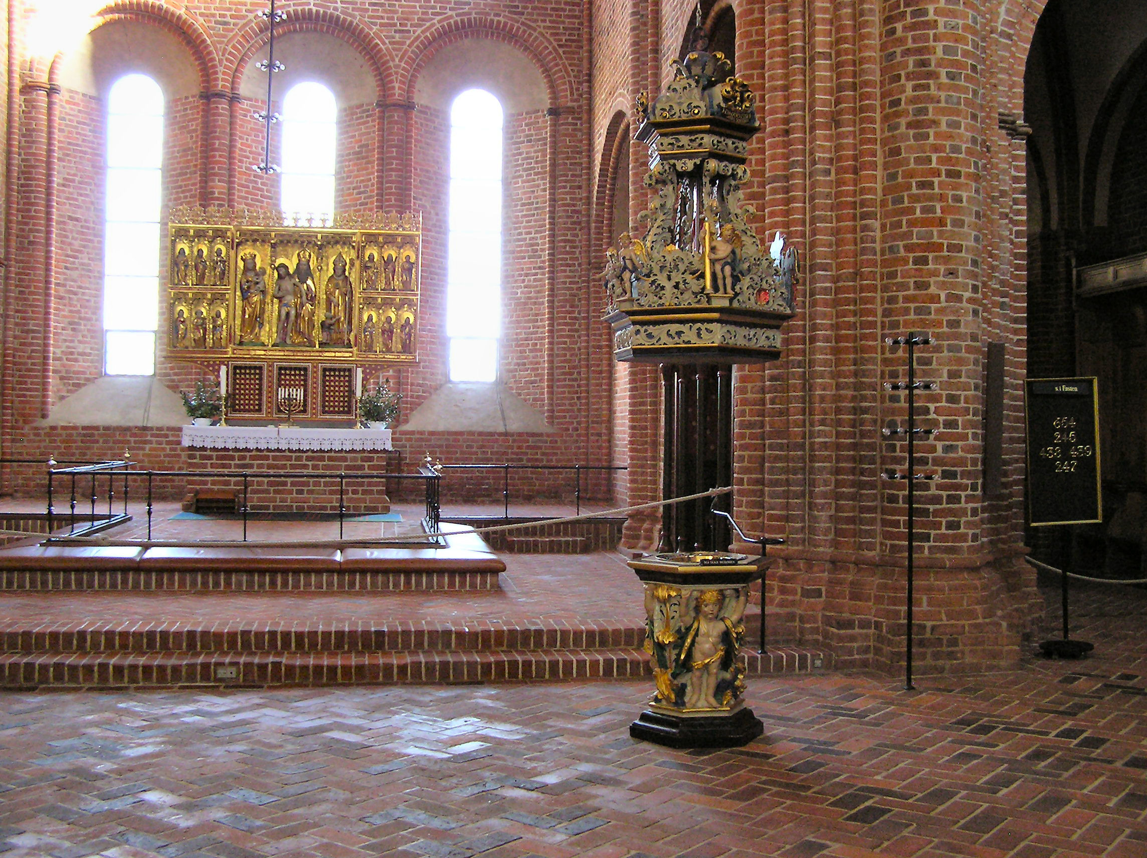 Løgumkloster Kirke